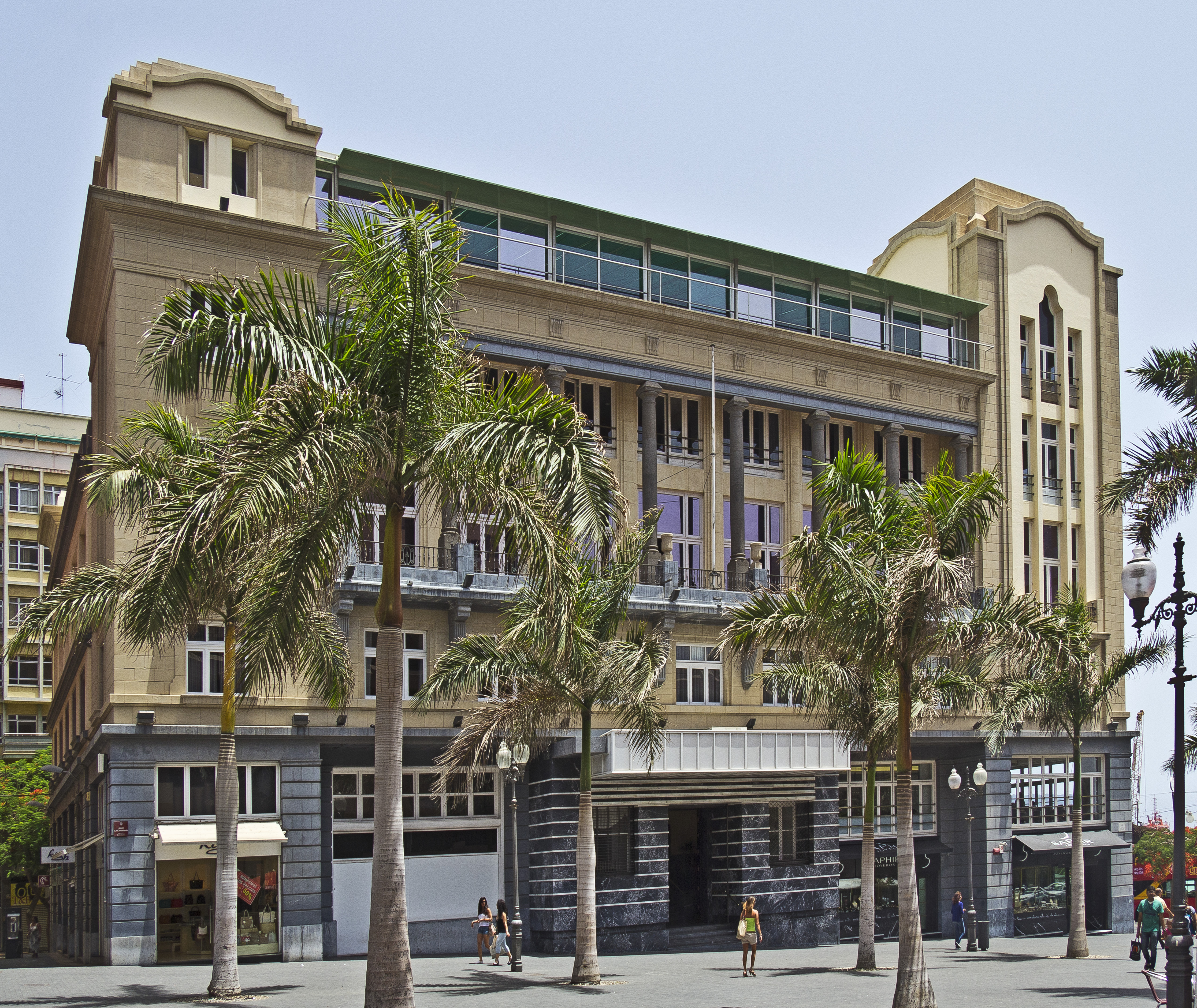 Das Casino de Tenerife befindet sich an der Ecke der Plaza de España und der Plaza Candelaria in Santa Cruz de Tenerife. Es wurde im Jahr 1935 fertiggestellt. Der Architekt war Miguel Martín Fernandez de la Torre. Das Gebäude steht seit dem Jahr 2006 unter Denkmalschutz.